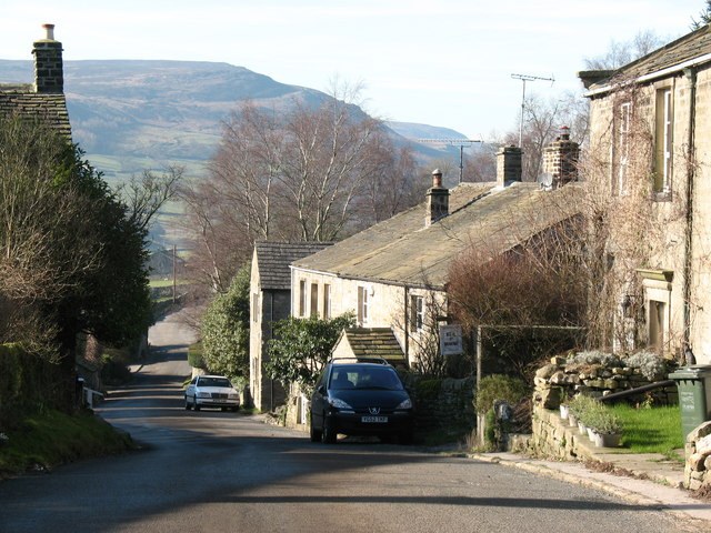 Village street, Appletreewick